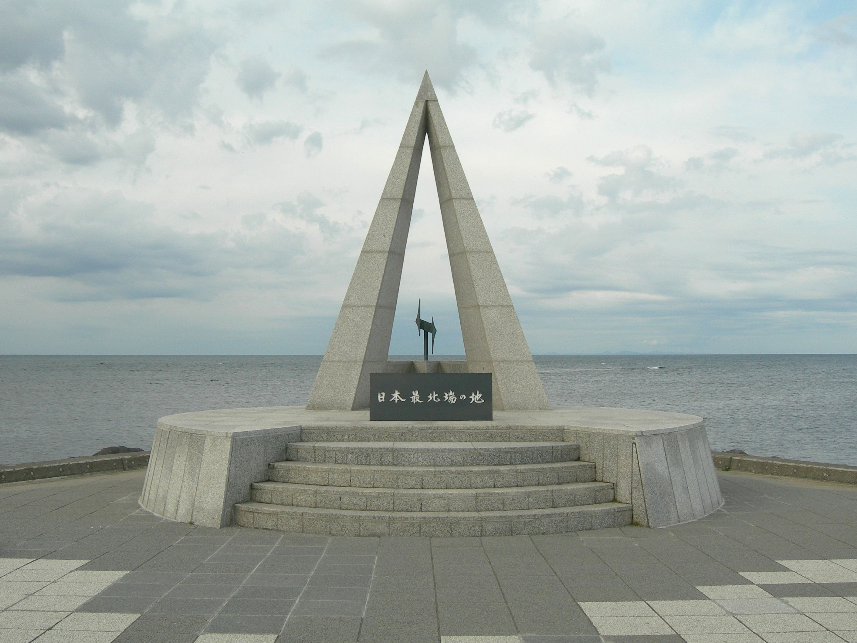 日本最北端の地の碑